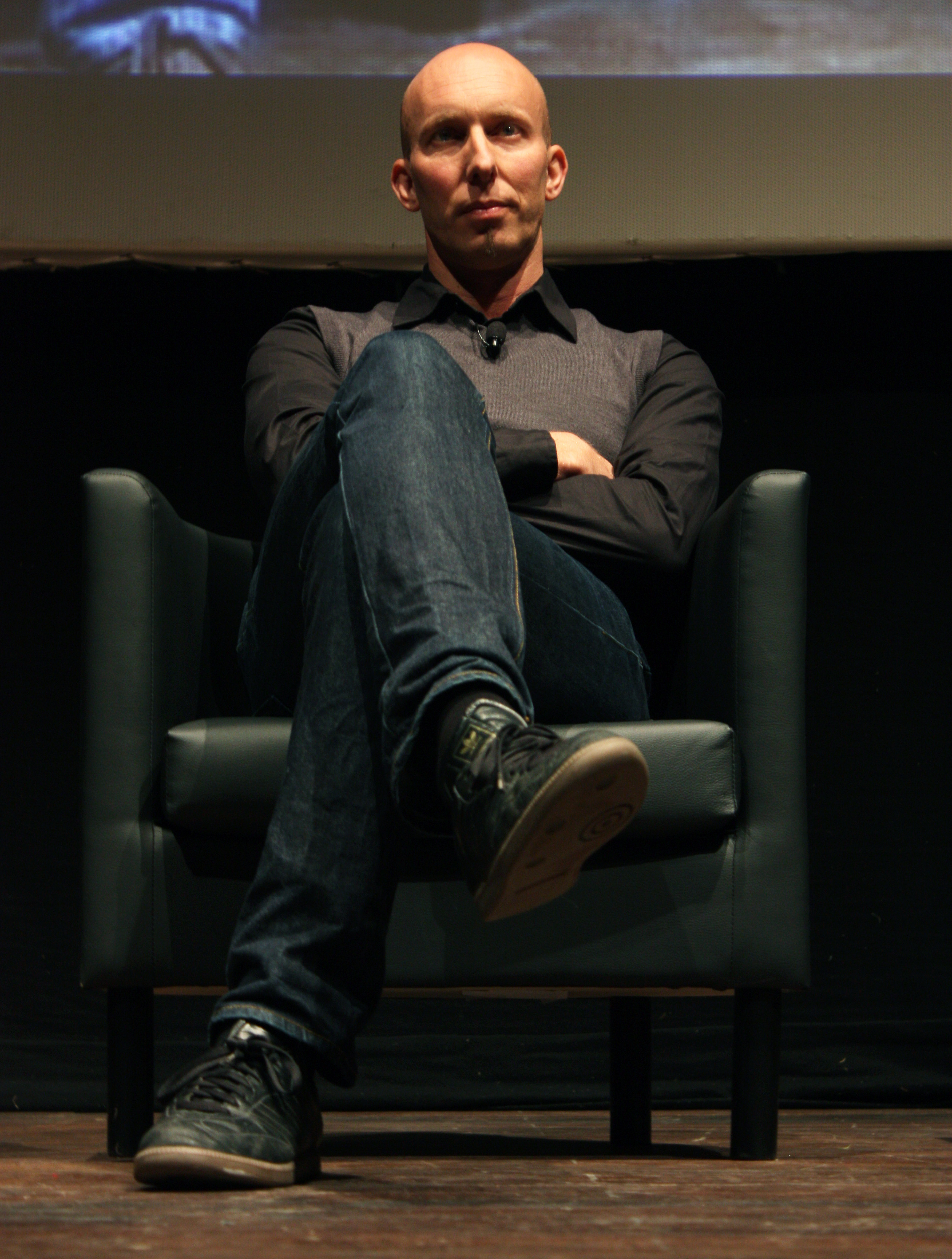 Erik Gandini @daniele